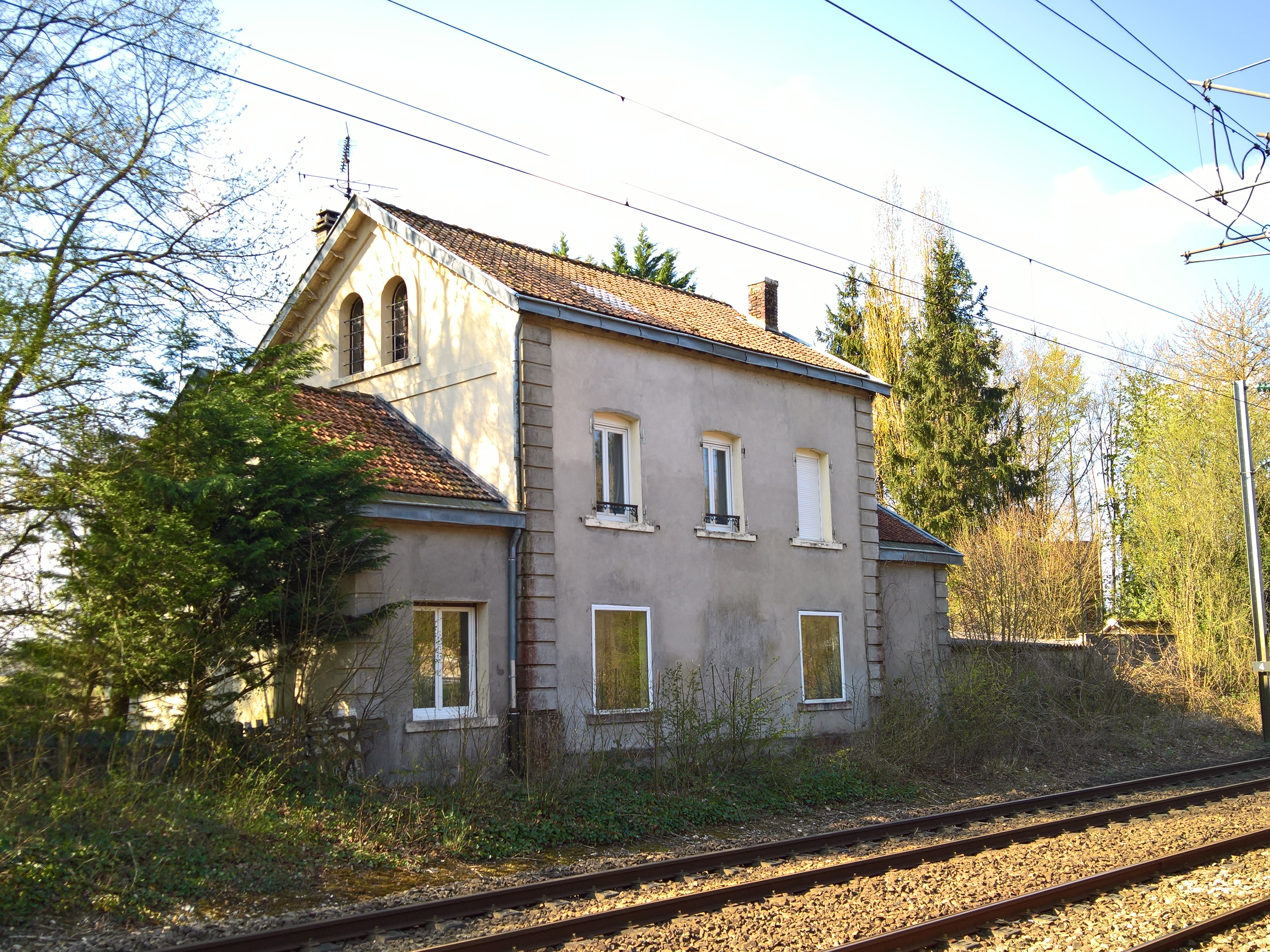 Ligne de Saint-Roch à Darnétal-bifurcation : l'ancien bâtiment voyageurs de la gare de Bacouel-sur-Selle.